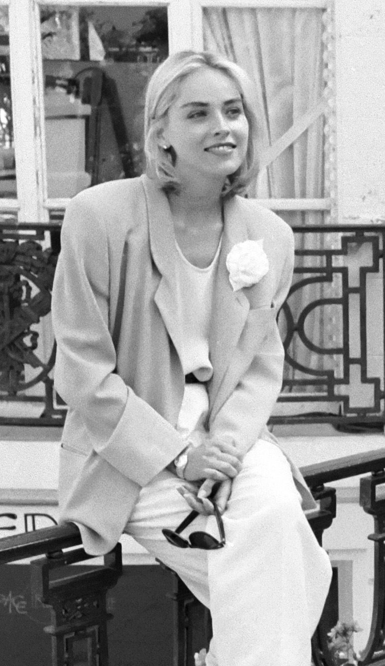 Sharon Stone au Festival du cinéma américain de Deauville (Calvados, France).